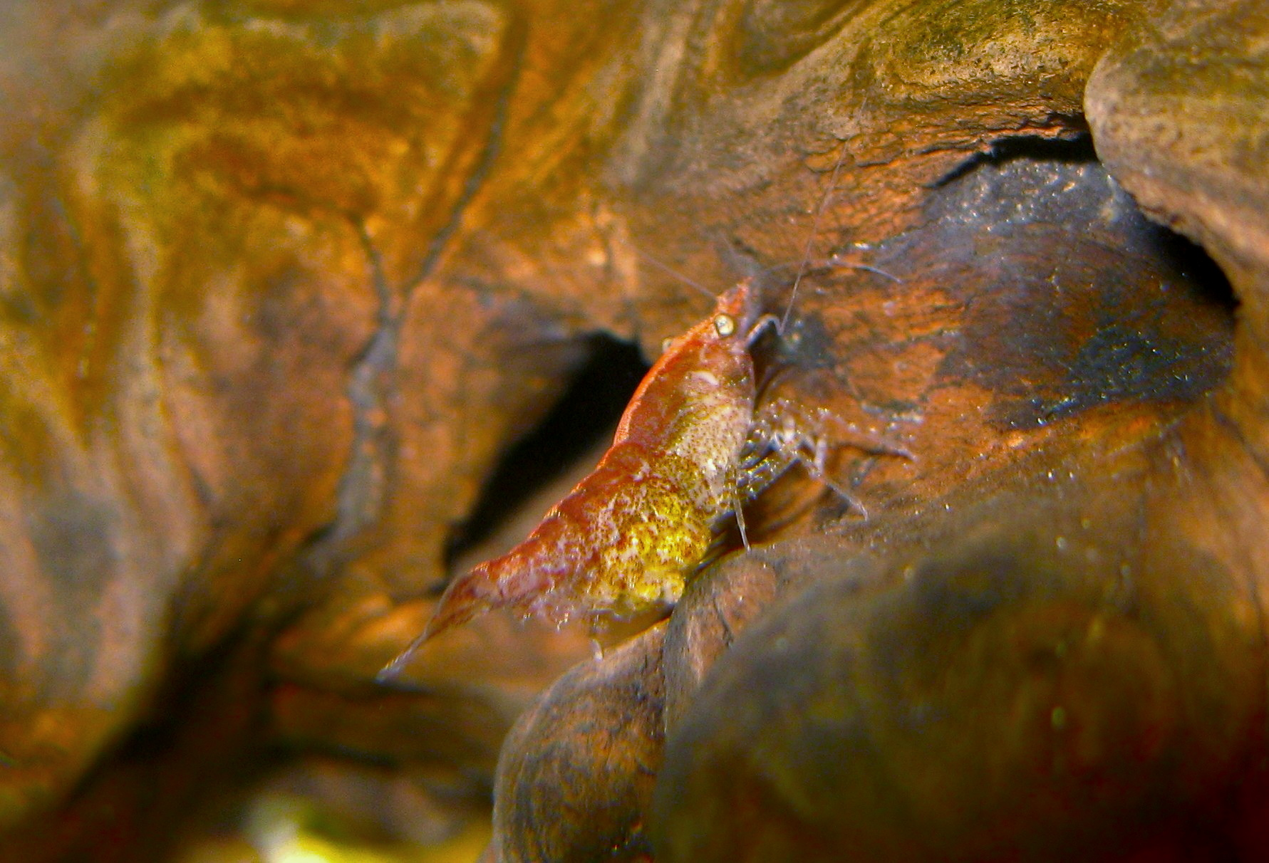 Krewetka Red Cherry z jajkami przeczepionymi pod tułowiem w akwarium na konarze